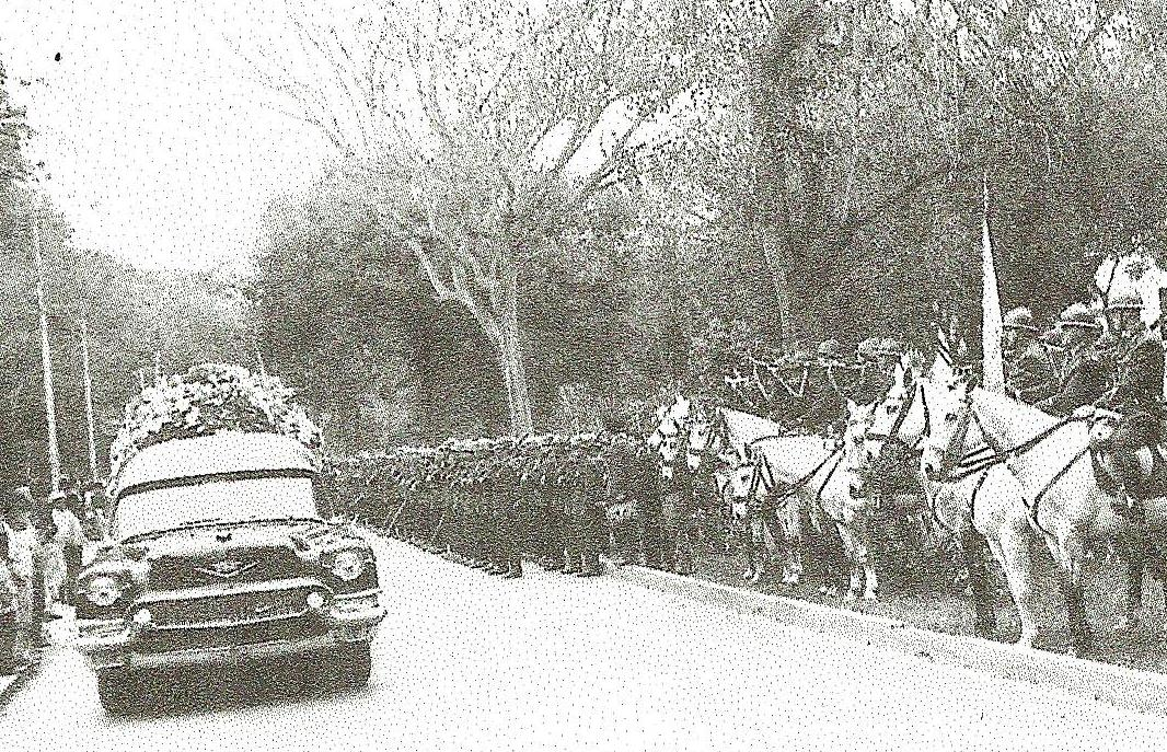 Vista Parcial de los honores militares de ordenanza realizados en el entierro del General GC Fernando Rincón Jaramillo. Pueden verse en primer plano a la 24ª Comandancia de la Guardia Civil - Caballería, que vino de su Cuartel "El Potao", y a la 22ª Comandancia de la Guardia Civil - Tropas de Asalto. Estuvieron también la Banda de música, que él fundó, y la 29-CGC-Radio Patrulla cuya creación el promovió